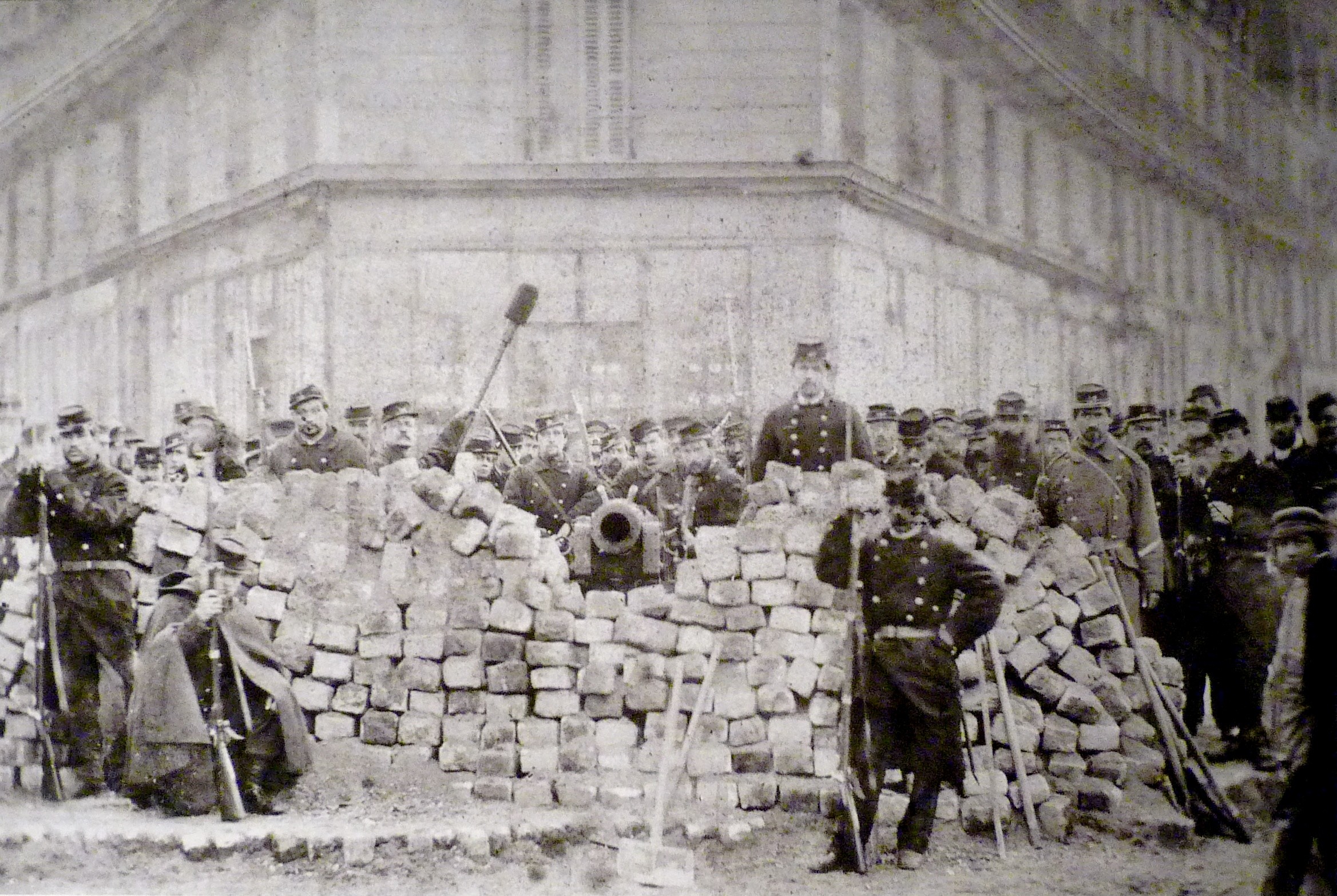 Exposition La Commune de Paris à l'Hôtel de Ville de Paris (18 mars - 28 mai 2011) - Barricade à l'angle des boulevard Voltaire et Richard-Lenoir. Elle défendit la mairie du 11e arrondissement où se replia la Commune le 25 mai - Bibliothèque historique de la Ville de Paris.